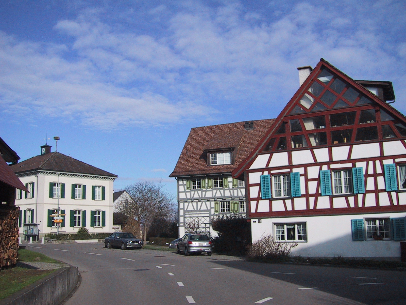 Aufnahme von Salenstein TG